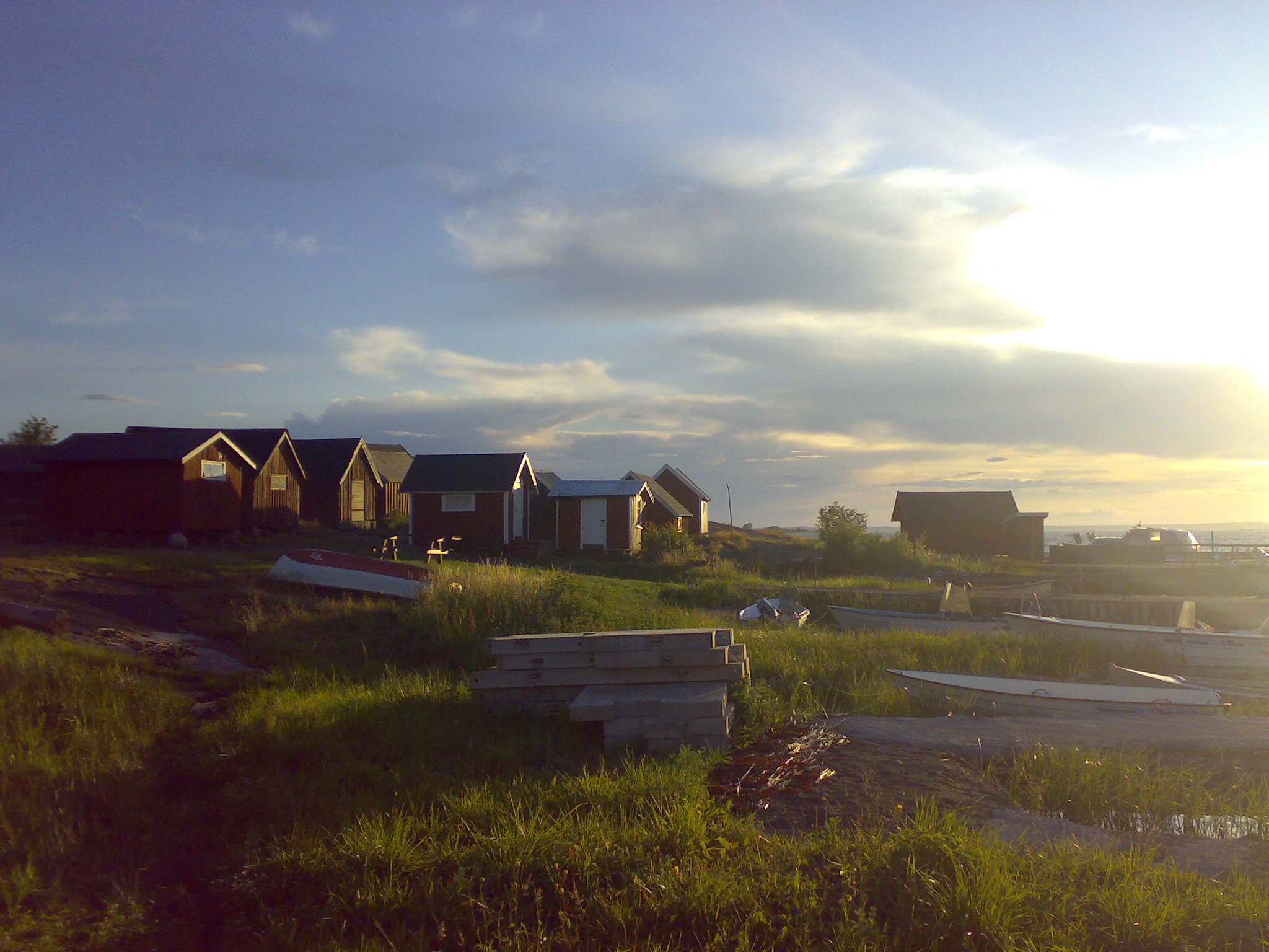 Hallarna, Hasslö, Sweden